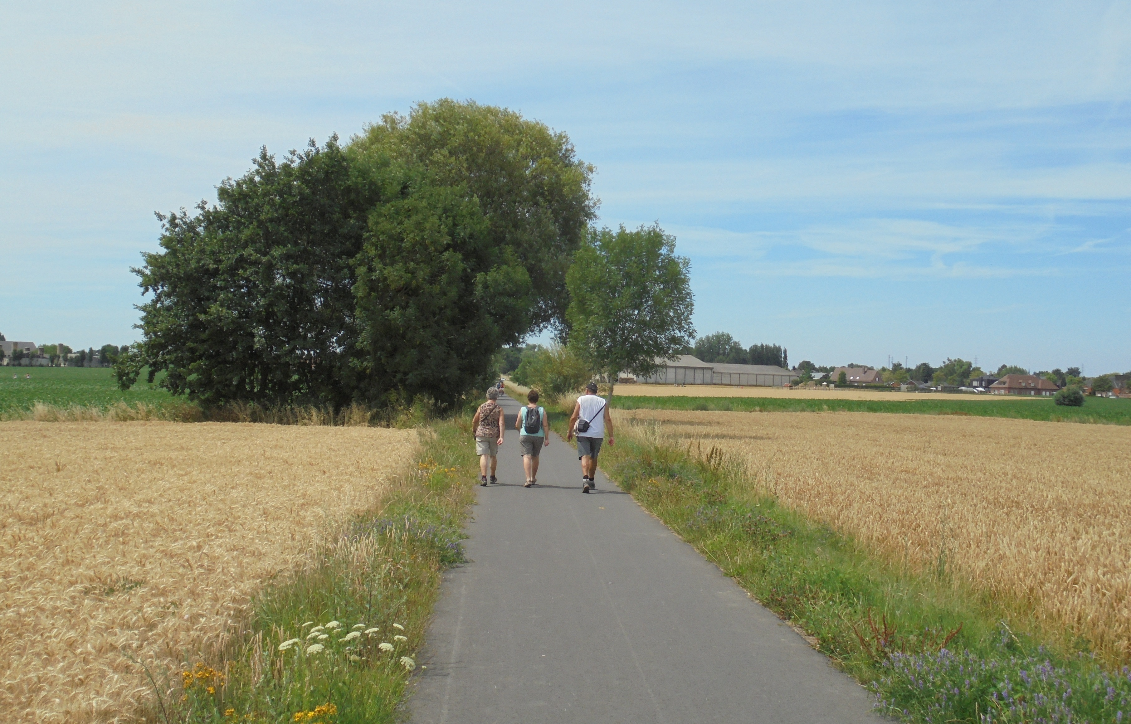 Spoorlijn 83 nabij de grens van Heestert met Avelgem - West-Vlaanderen - België